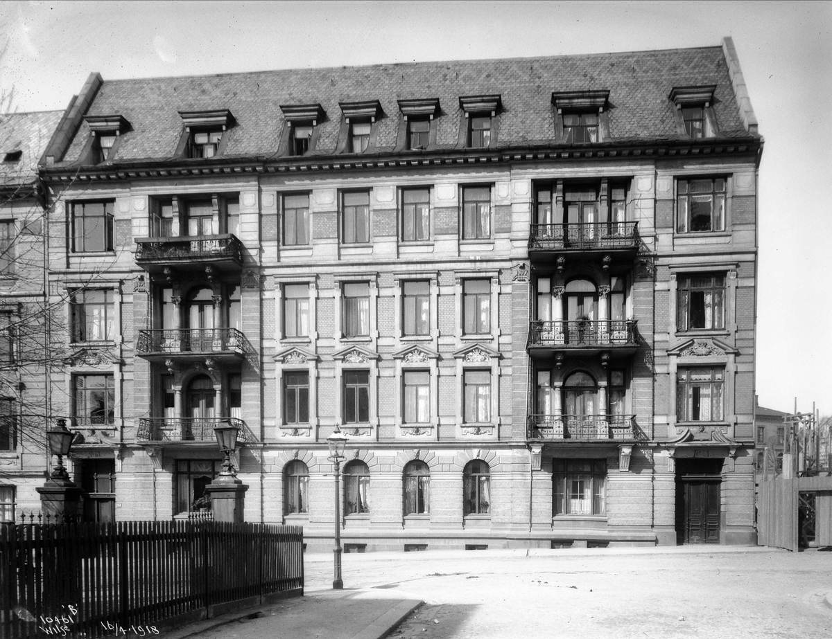 Parkveien 61 (revet), fotografert av Anders Beer Wilse i 1918. Fra Byhistorisk samling hos Oslo Museum.